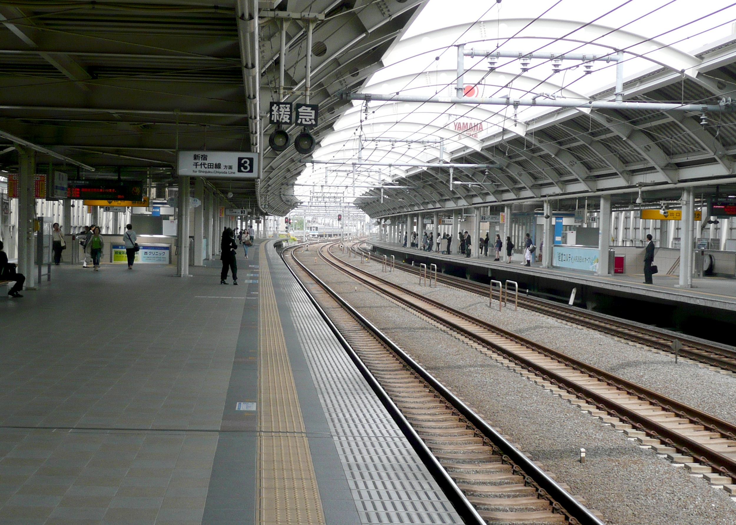 経堂駅ホーム